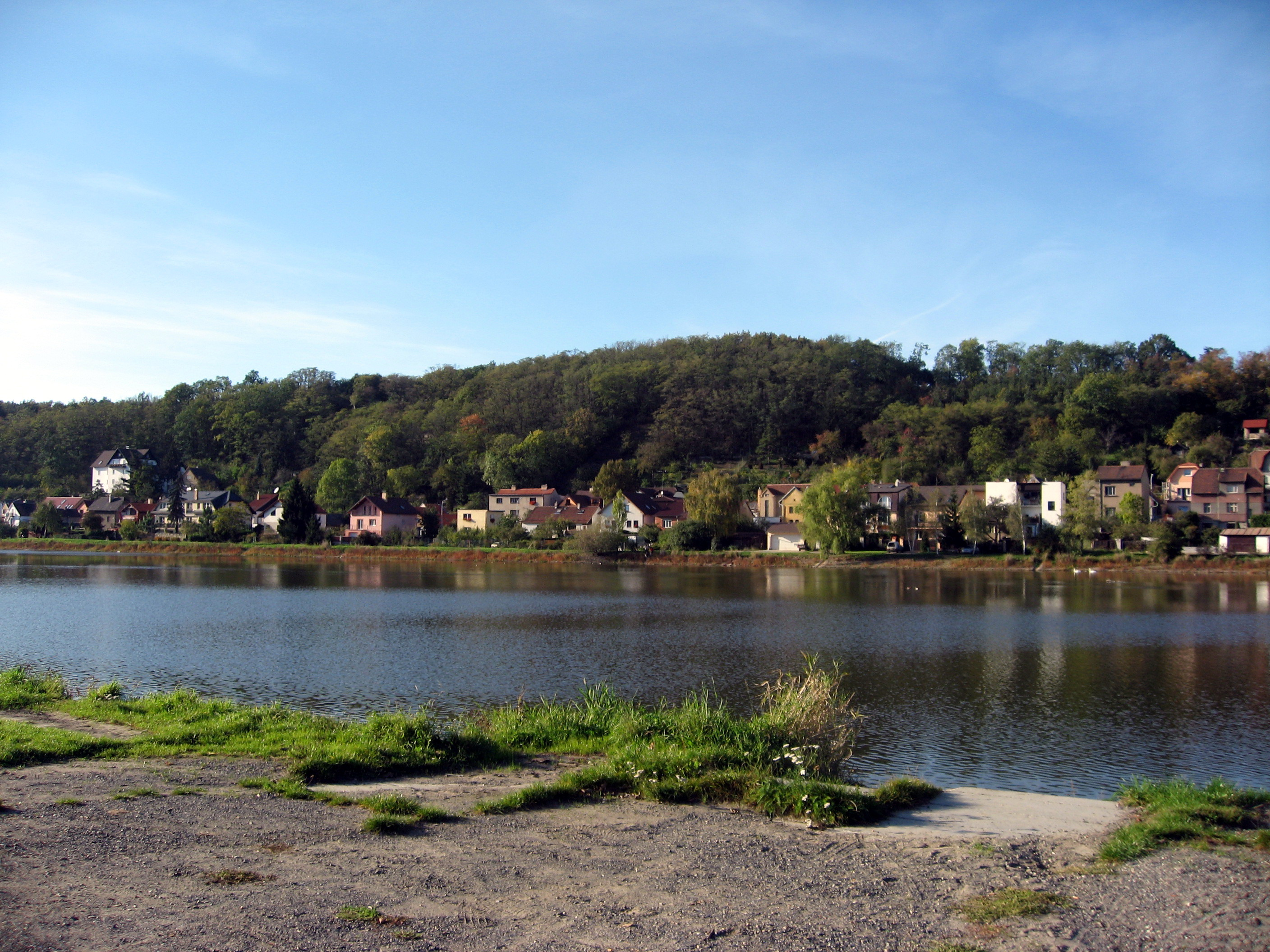 Kyjský rybník a domky u něj